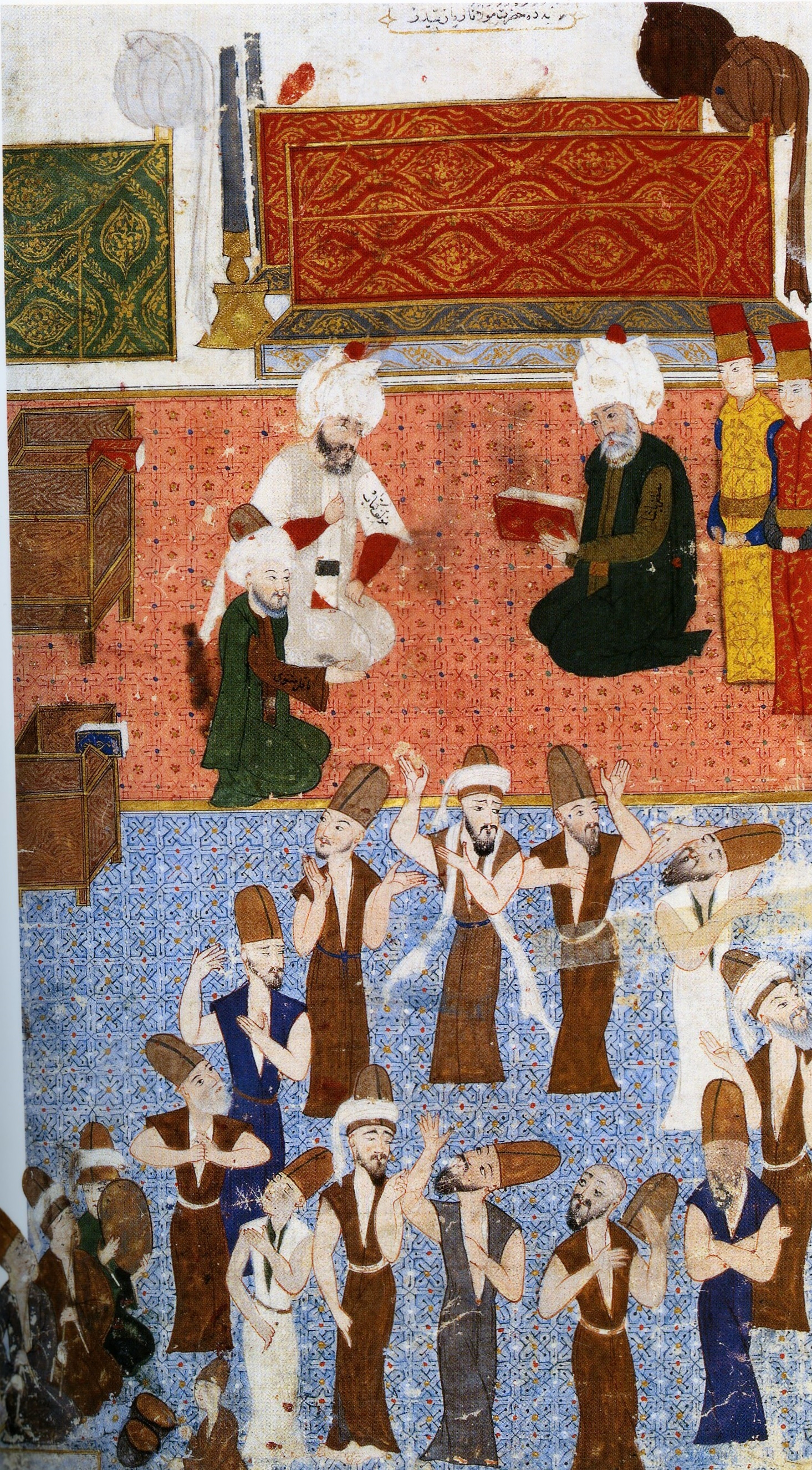 Lala Mustafa Paşa'nın Mevlana türbesini ziyareti